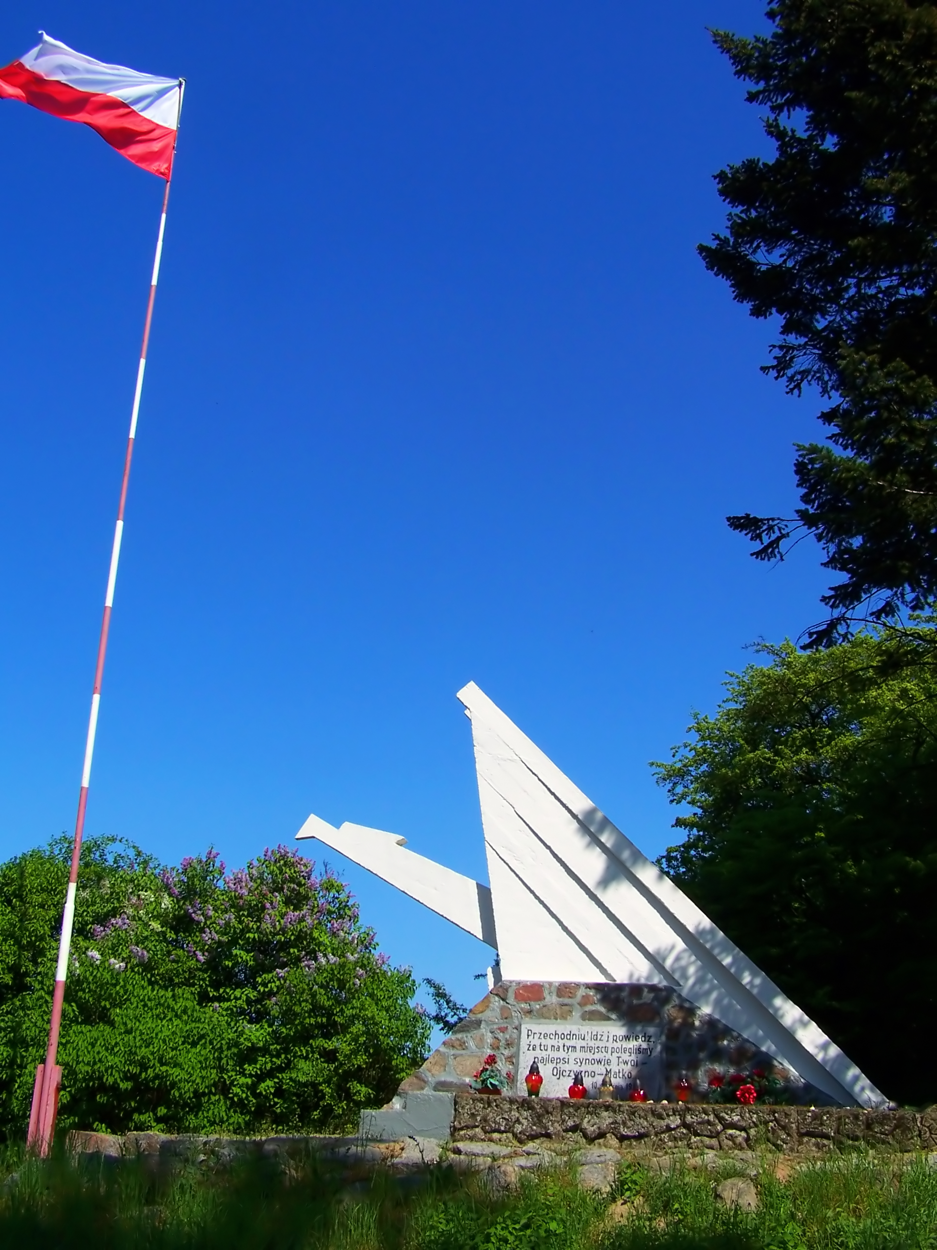 Pomnik w Niewolnie